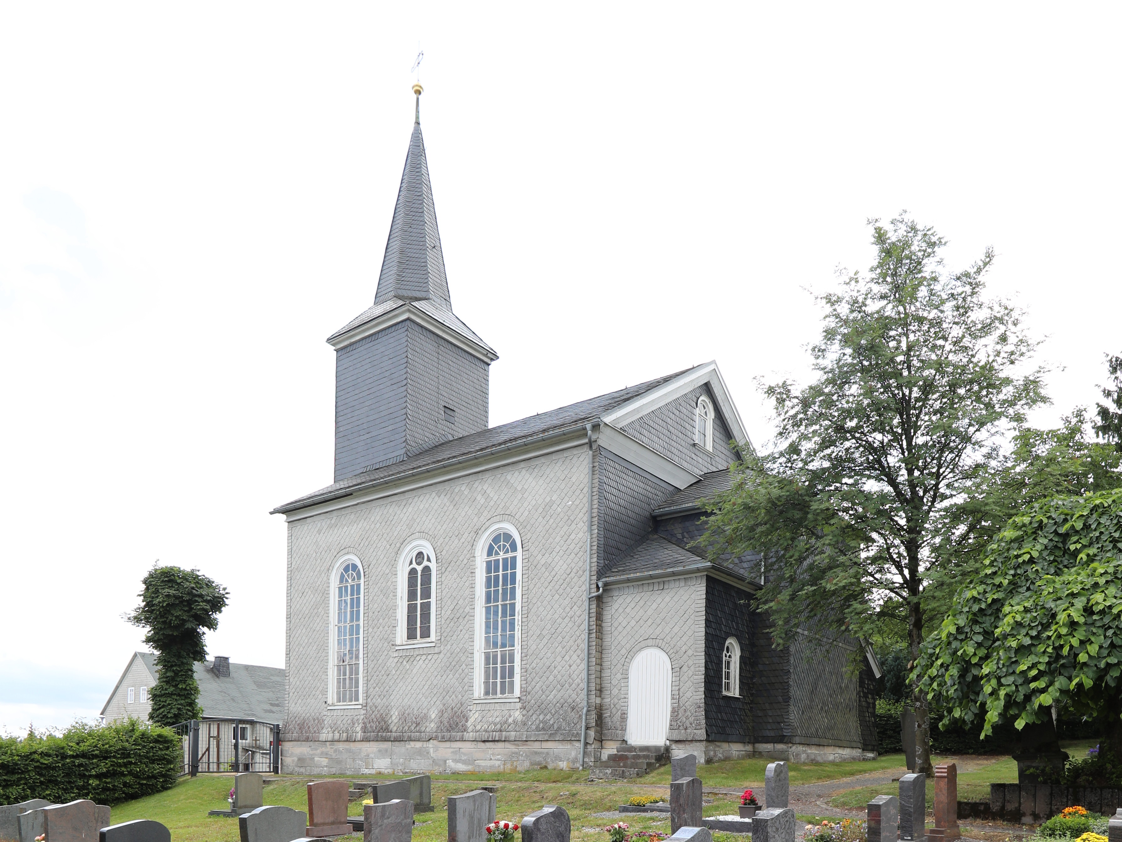 Bergkirche in Masserberg